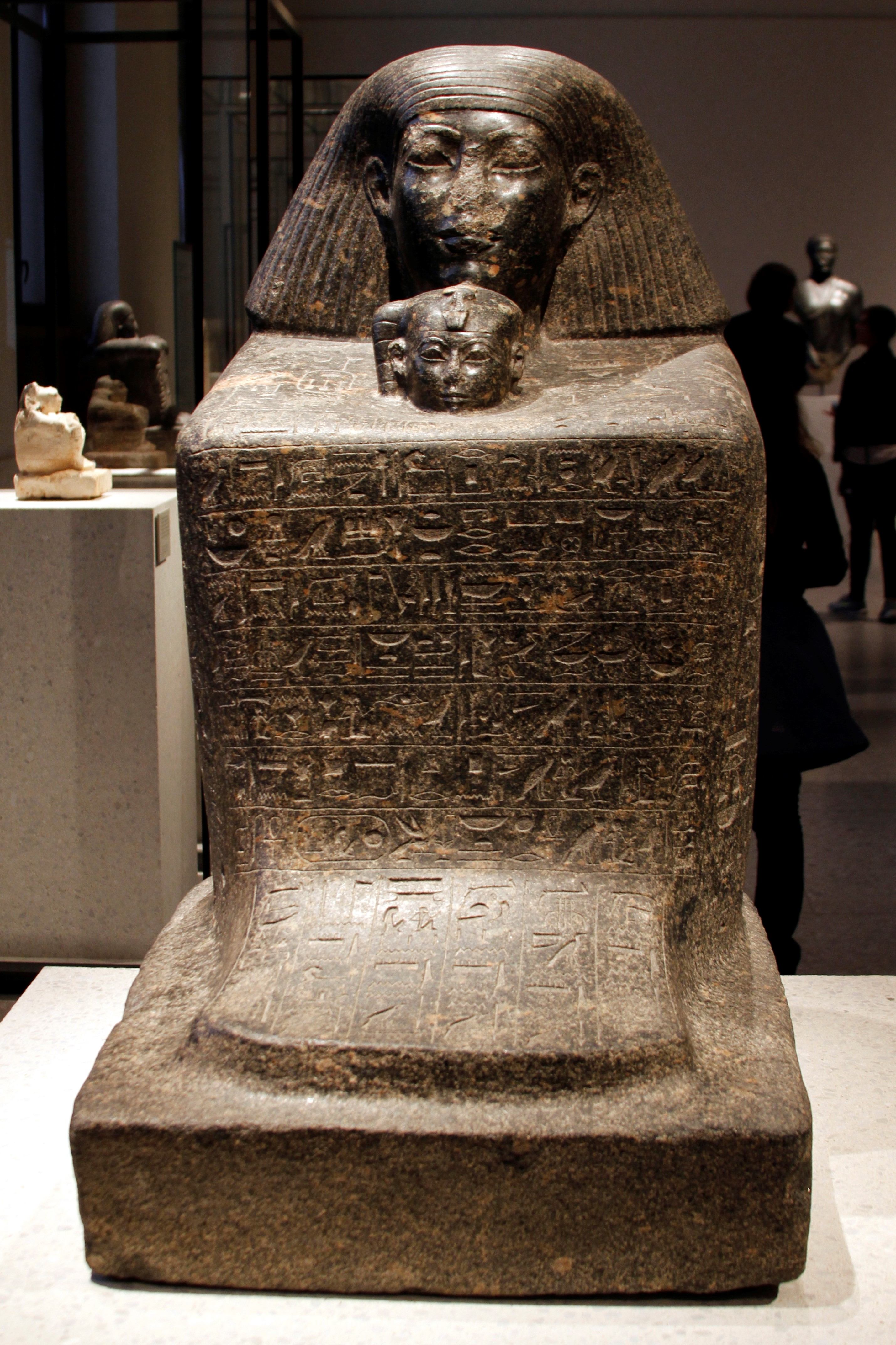 Neues Museum - Berlin - Germany